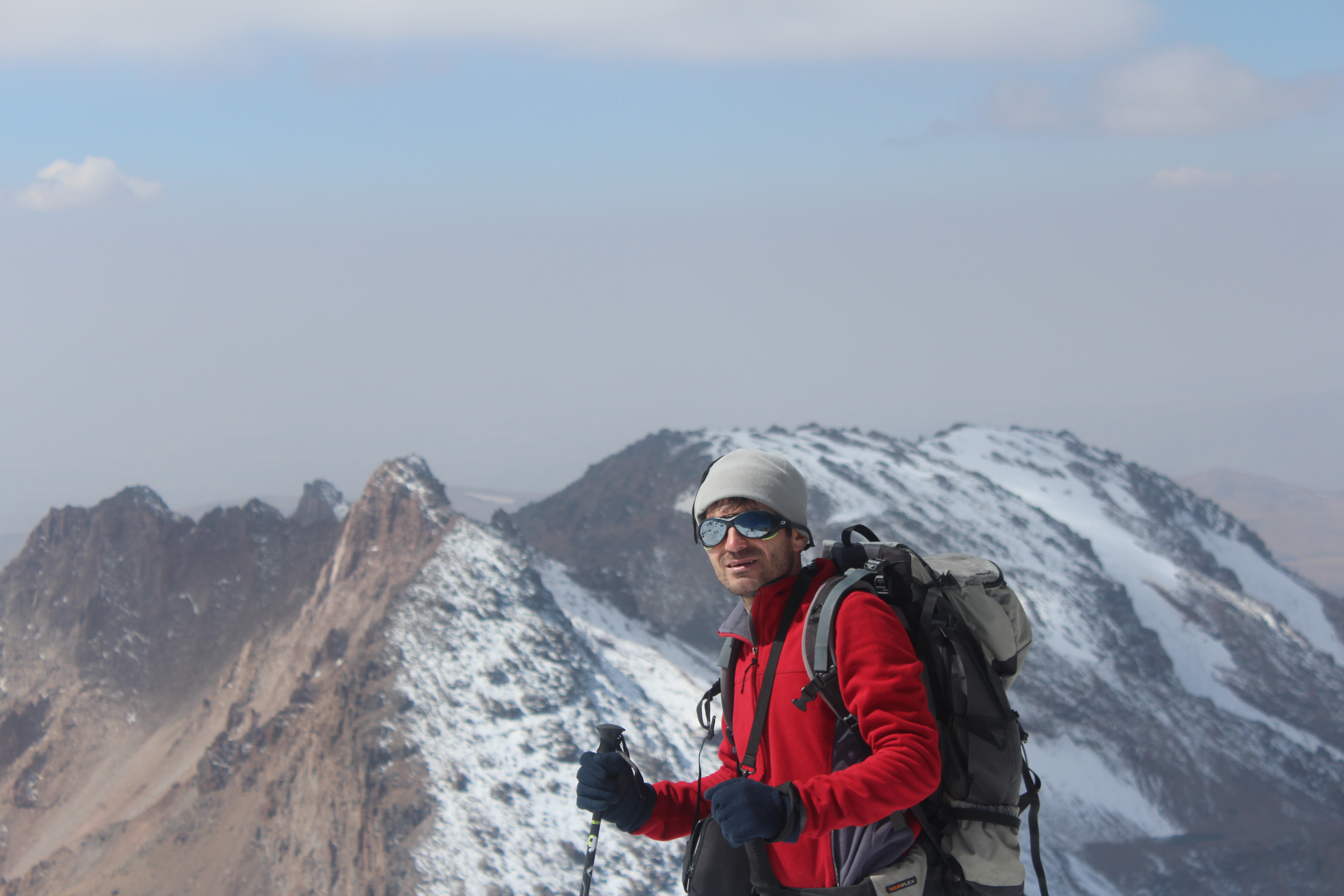 Bu şəkil dağ yürüşü zamanı çəkilmişdir